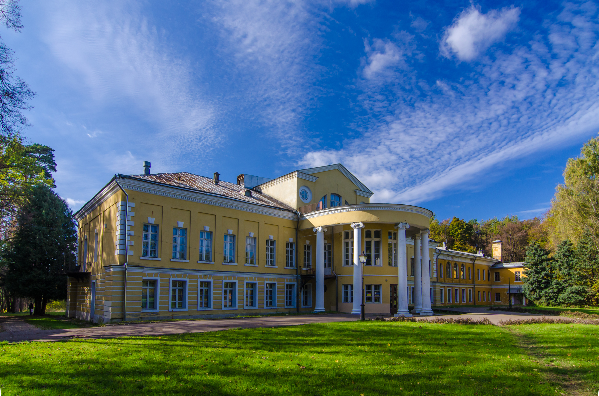 Главный дом (с северным флигелем): д/о «Суханово», Видное-2, Ленинский район, Московская область